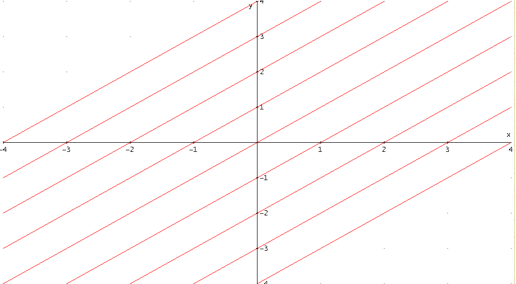 immagine fatta da me con un programma per studi di funzione, no copyright